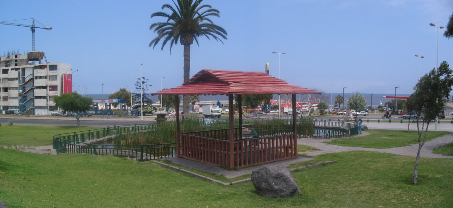 Parque Japonés. Antofagasta, Chile.